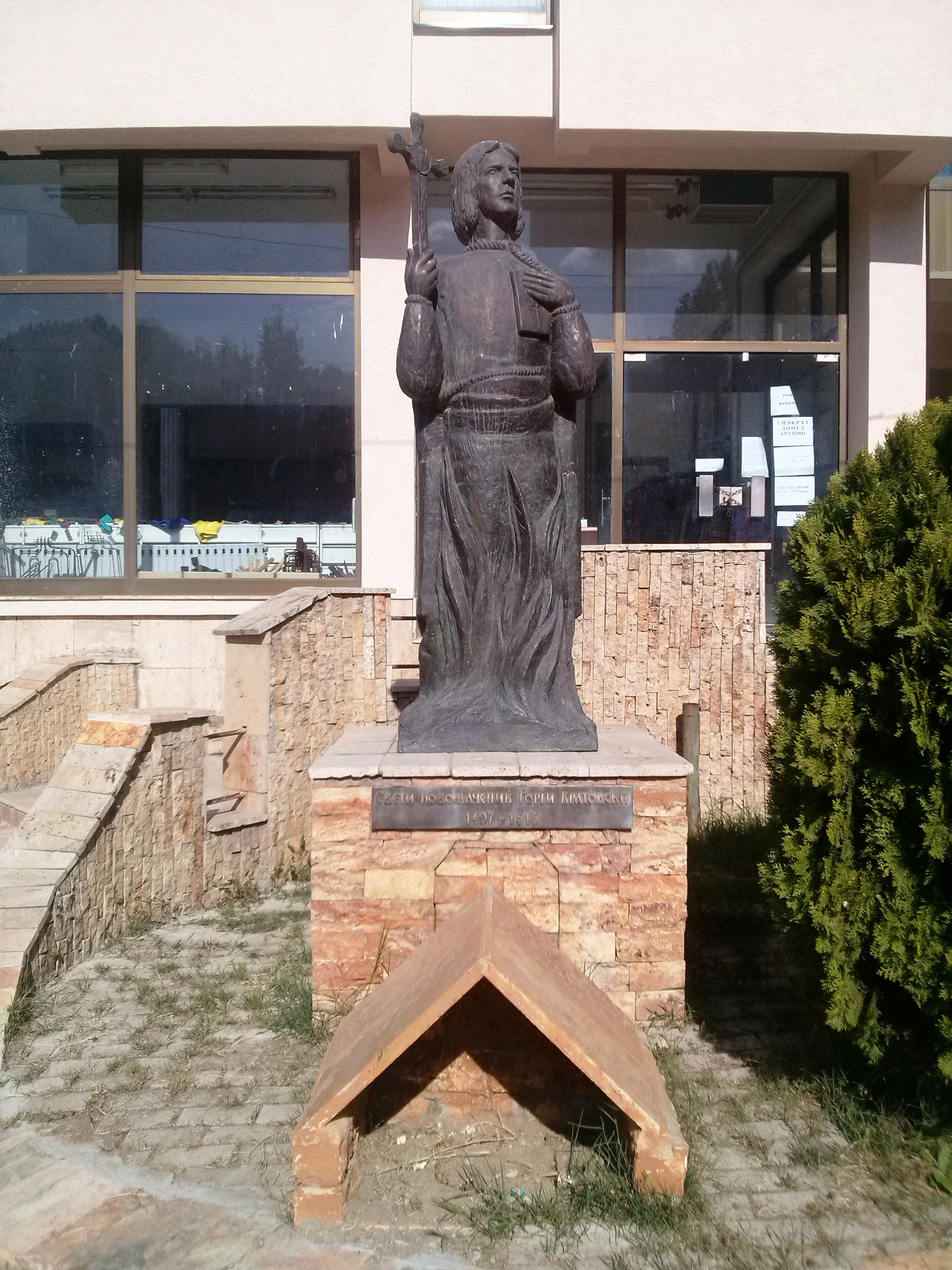 Кратово